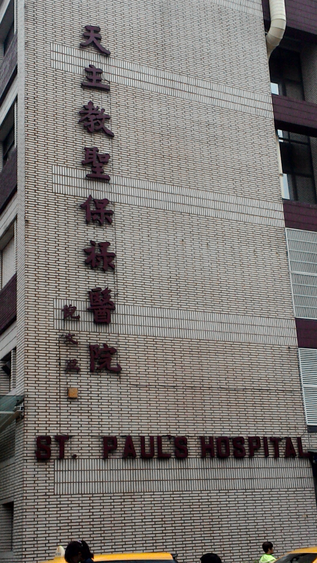 聖保祿修女會醫院的倪文亞題字,位於桃園市桃園區大樹林次分區福安里